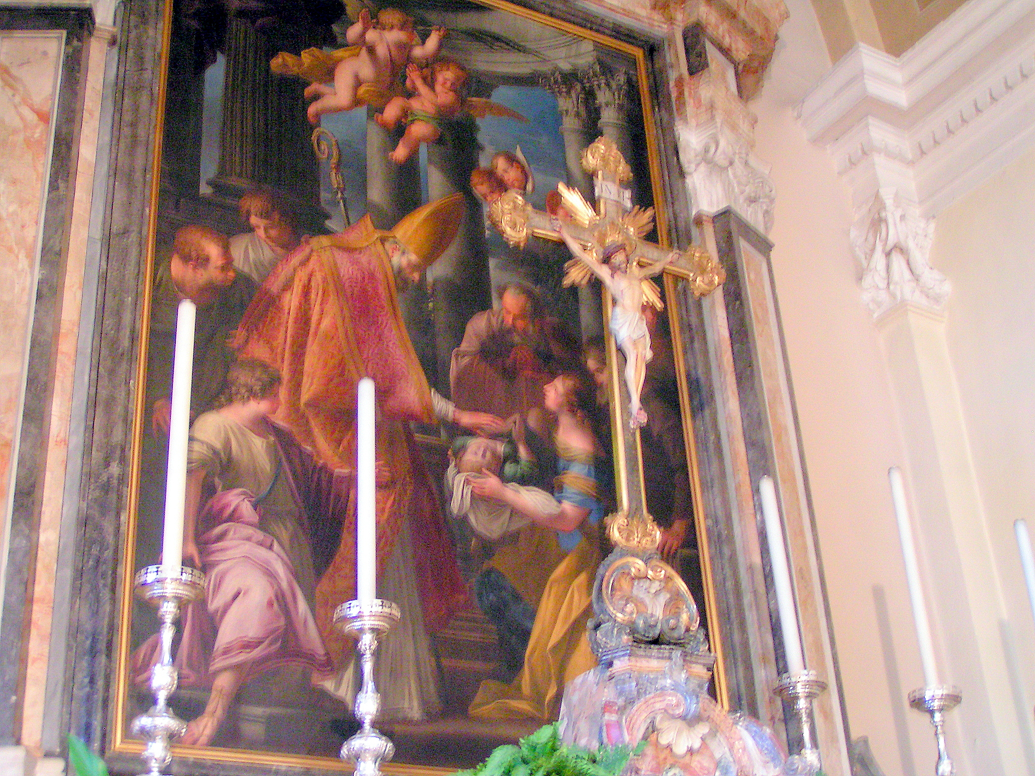 Giovanni Ghisolfi Miracolo di San Biagio Chiesa parrocchiale di Magliaso